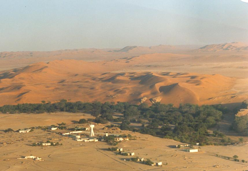 Eine Luftaufnahme des Gobabeb Training and Research Centres